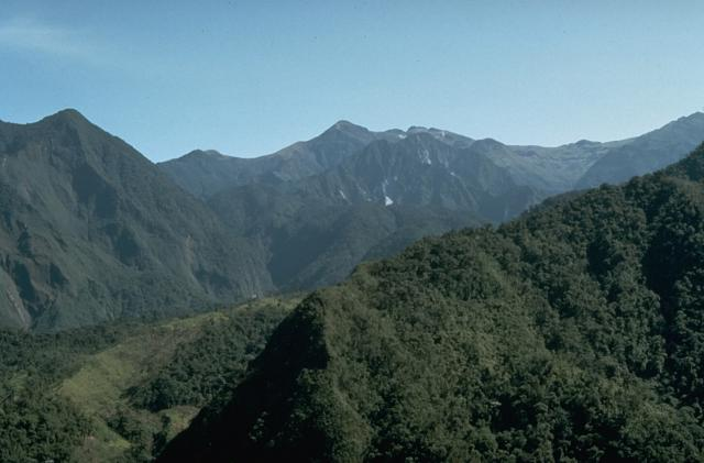 Volcano Atacazo.